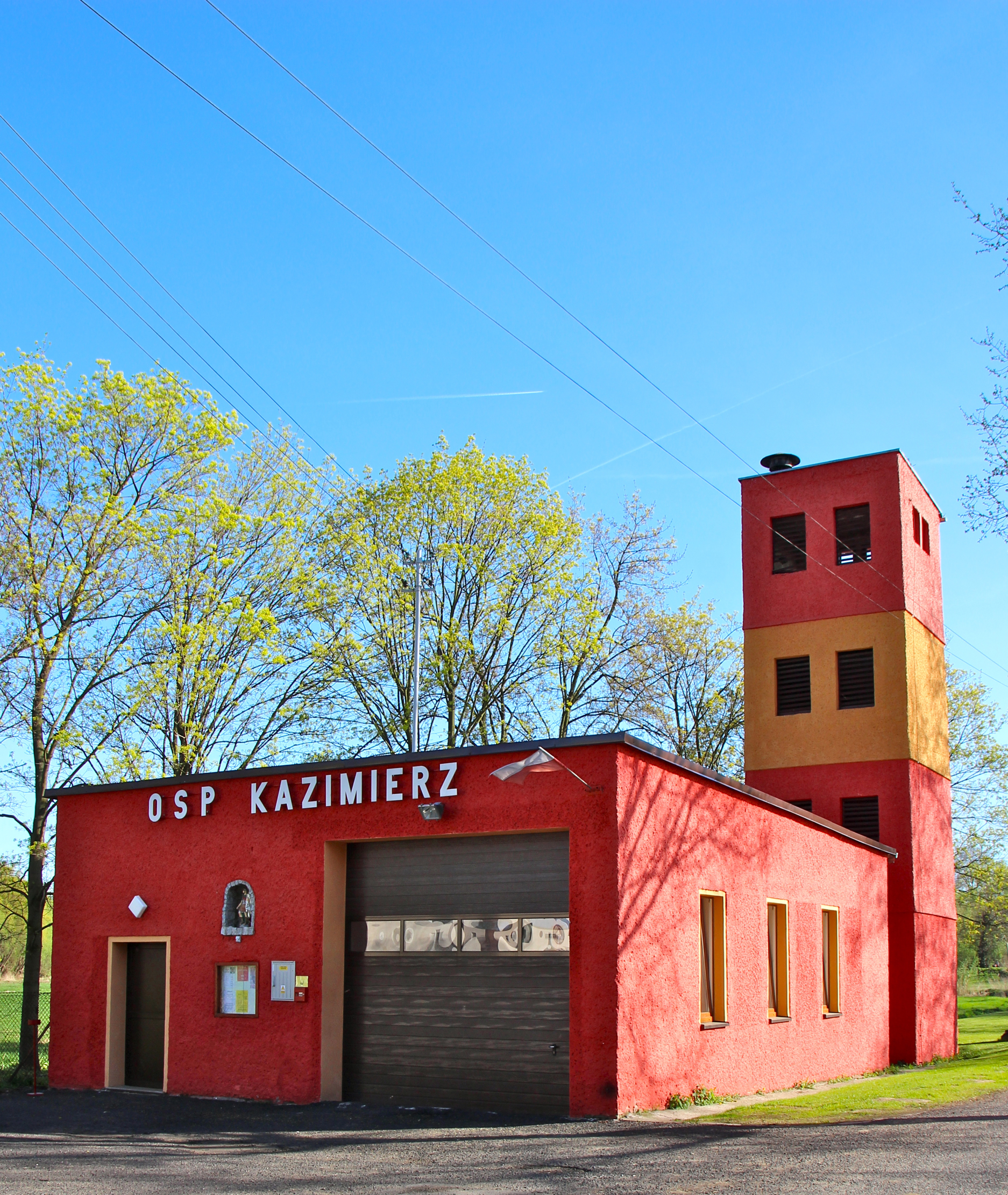 Kazimierz – wieś w Polsce położona w województwie opolskim, w powiecie prudnickim, w gminie Głogówek.